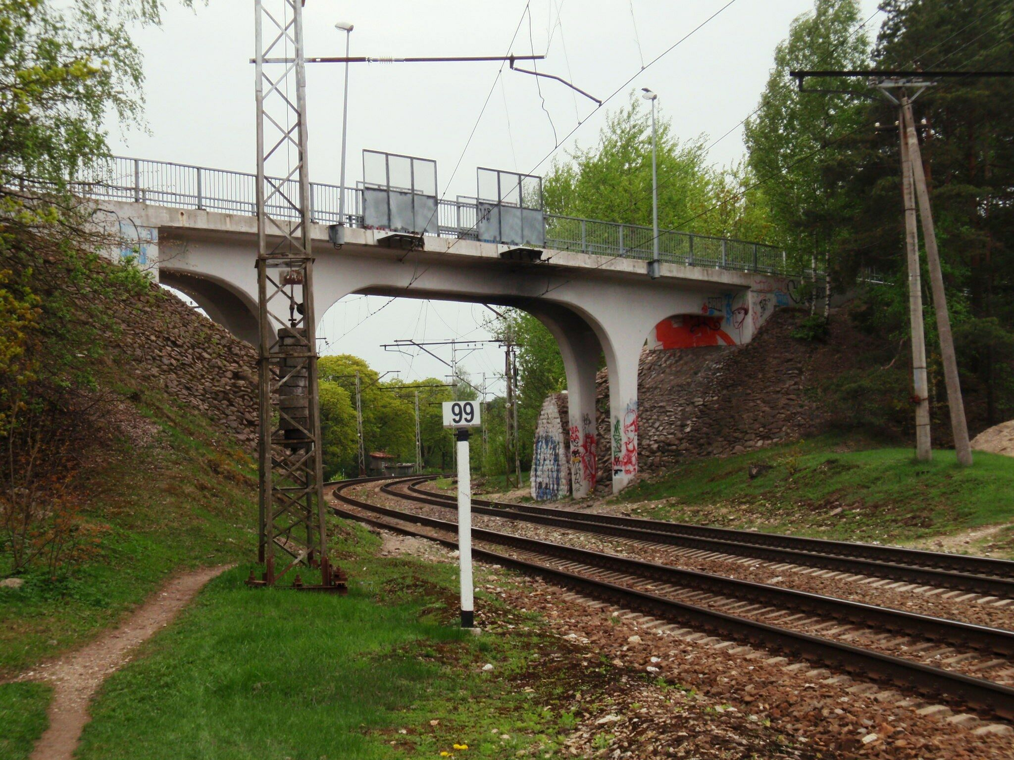 Rahumäe sild